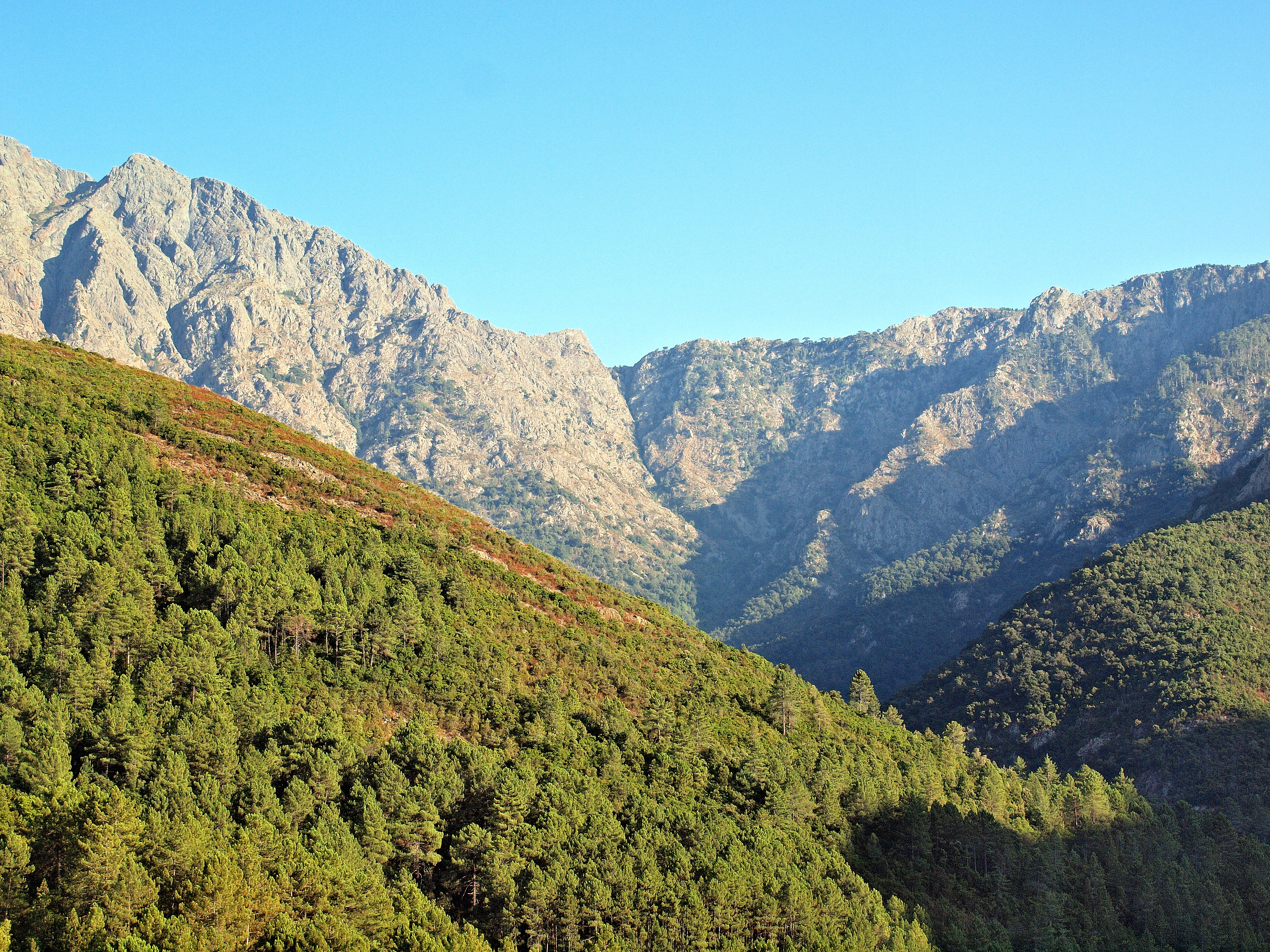 Manso, Balagne (Corse) - Vue de Bocca di Capronale (1329 m) « à cheval » sur Manso et Évisa